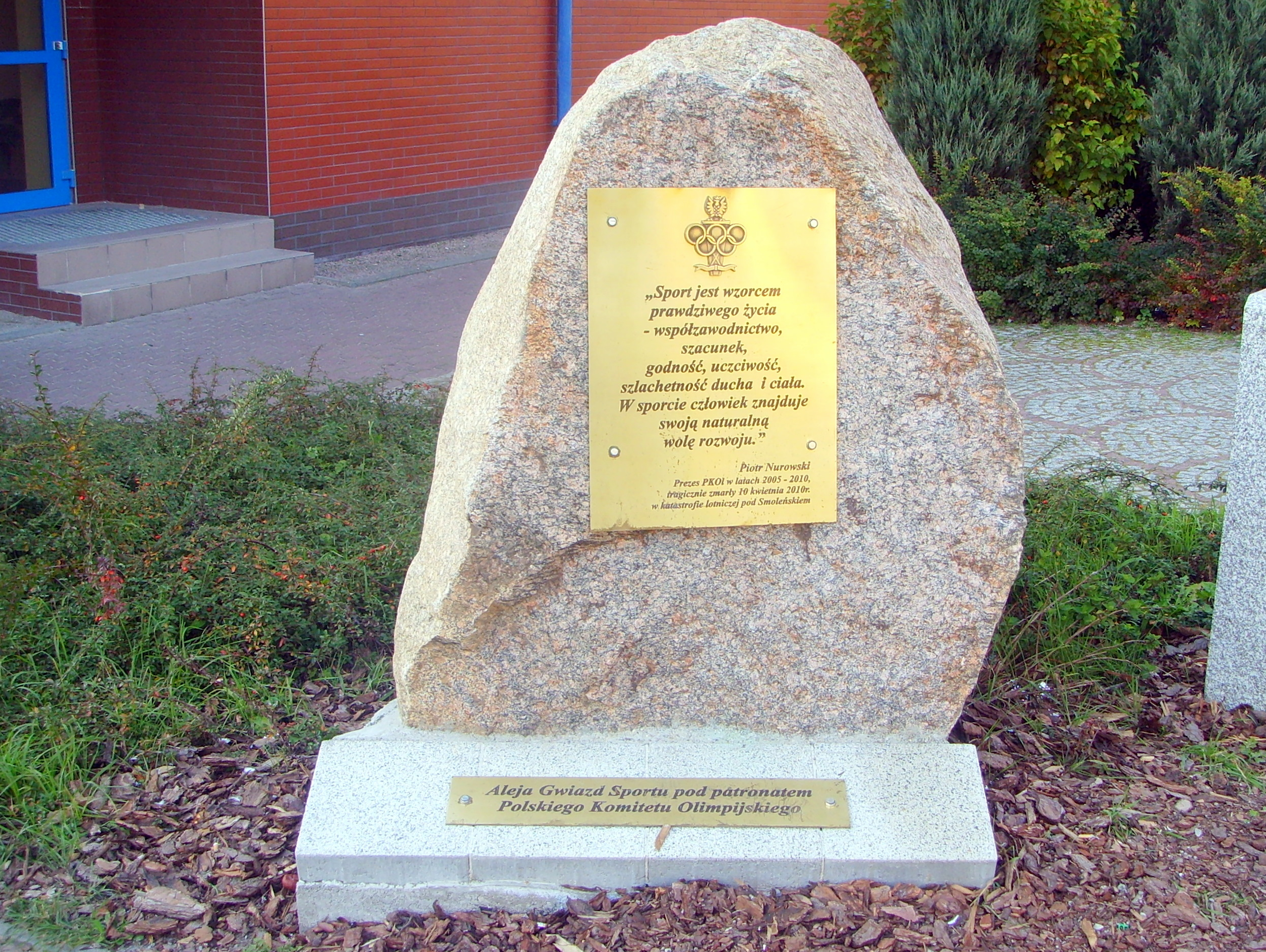 Aleja Gwiazd Sportu w Dziwnowie. Tablica głowna